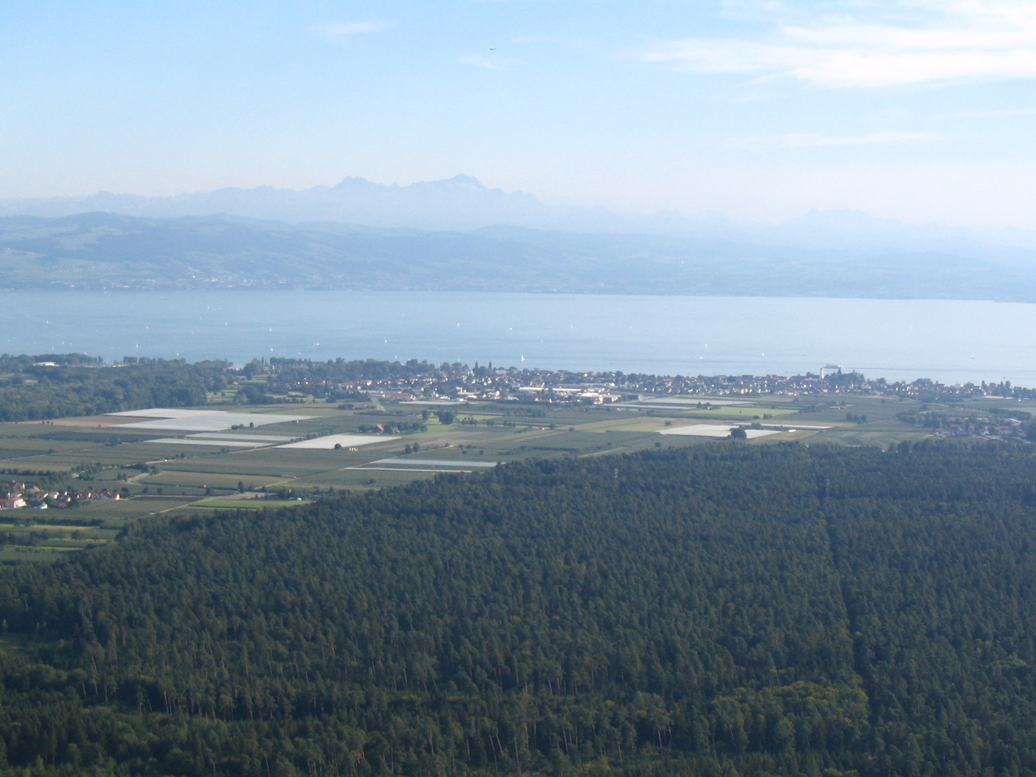 Langenargen am Bodensee